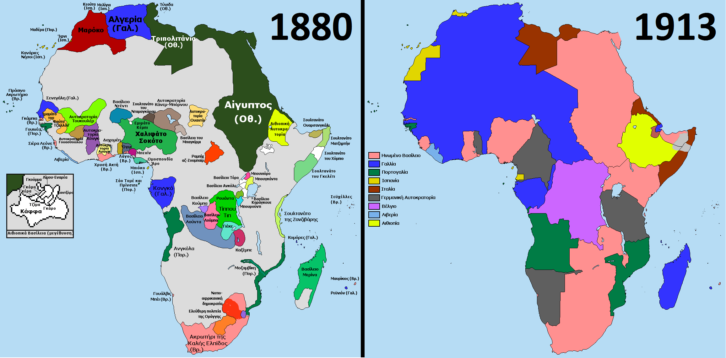 Σύγκριση της Αφρικής τα έτη 1880 και 1913. Δείχνει το πώς επηρέασε η Διαμάχη για την Αφρική την ήπειρο.